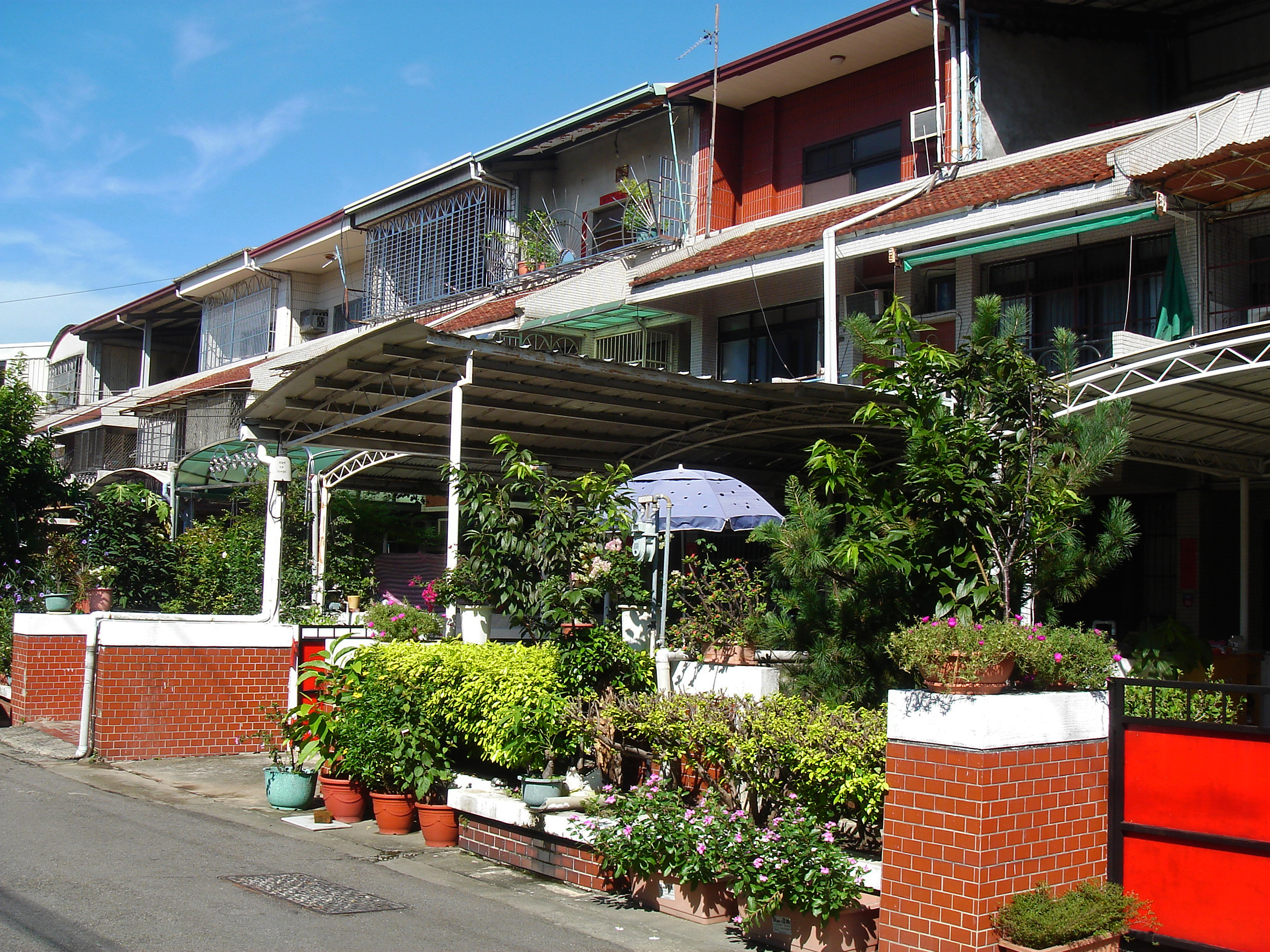 中文（台灣）: 台中市太平區台中小鎮。